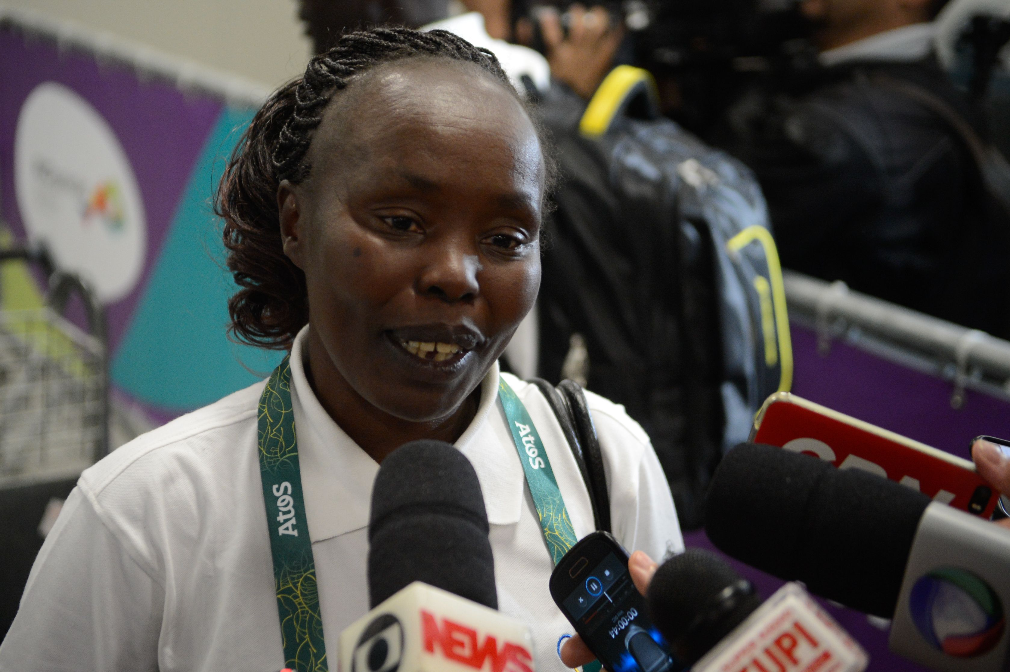 Rio de Janeiro - A chefe da missГЈo da Equipe OlГ­mpica de Atletas Refugiados, Tegla Loroupe fala apГіs chegada no Aeroporto RioGaleГЈo. (Foto: Tomaz Silva/AgГЄncia Brasil)